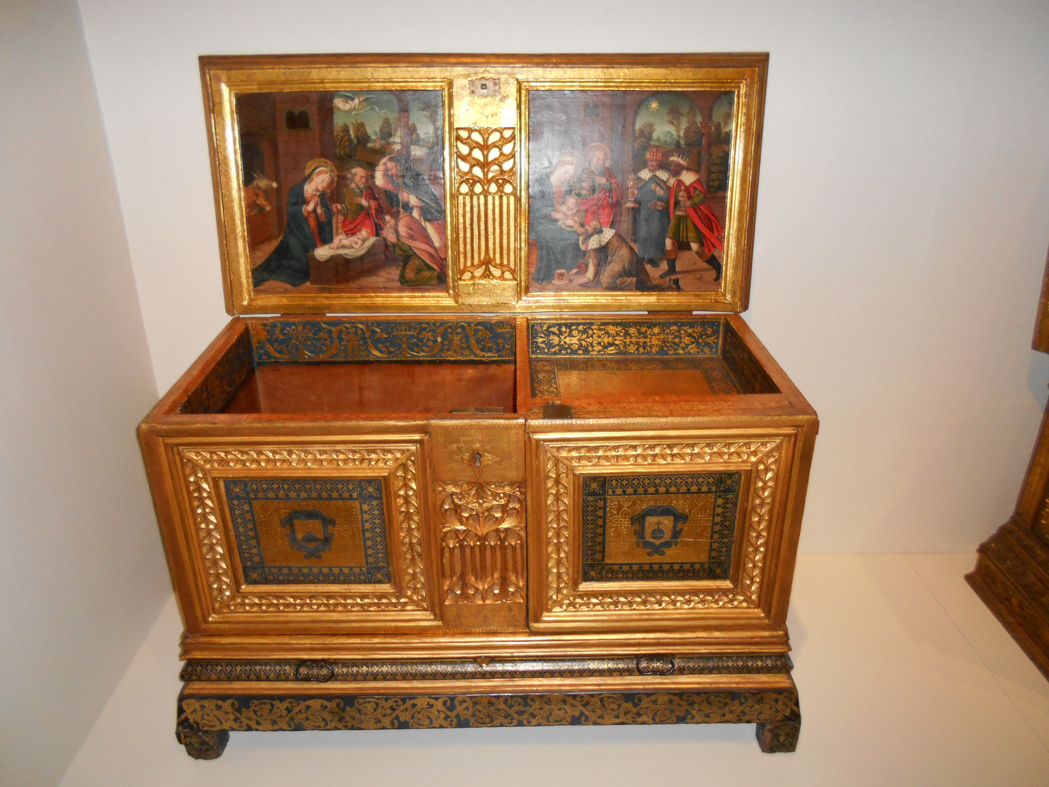 Arcón con escenas del Nacimiento y la Epifanía (c. 1525-1550), Museo del Diseño de Barcelona.